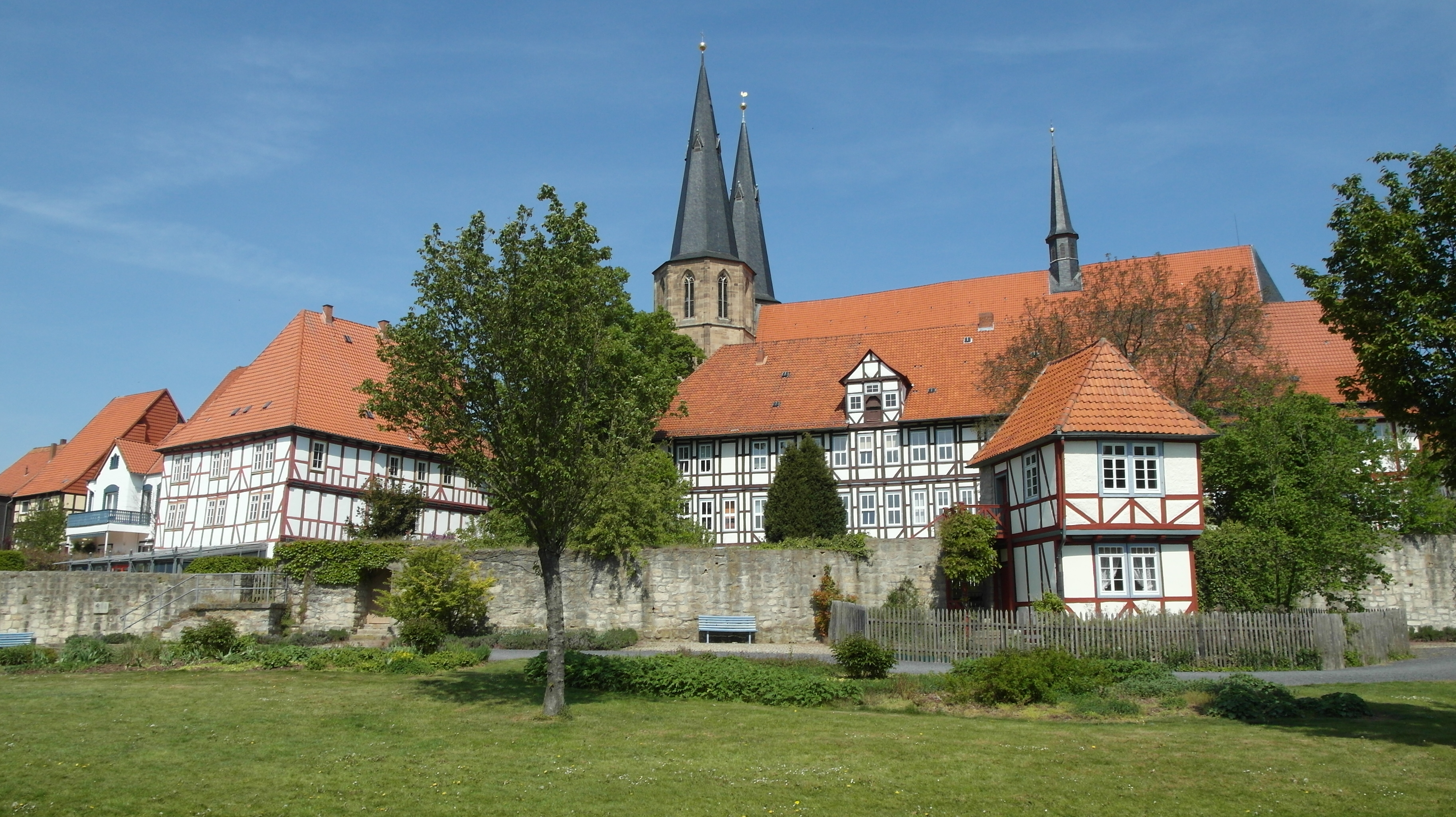 Pfarrhaus der Kath. St. Cyriakus Kirche in Duderstadt und die südliche Stadtmauer